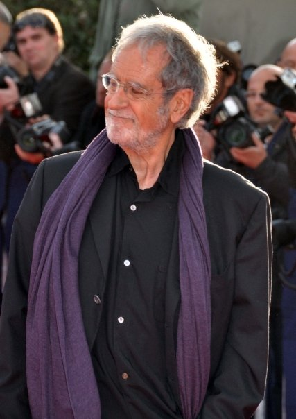 Edouard Molinaro au festival de Deauville 2009